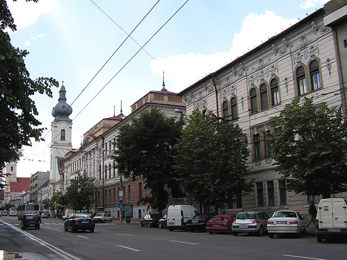 Cluj-Napoca, Liceul Unitarian "János Zsigmond" (Bulev. 21 Decembrie 1989 nr.9)